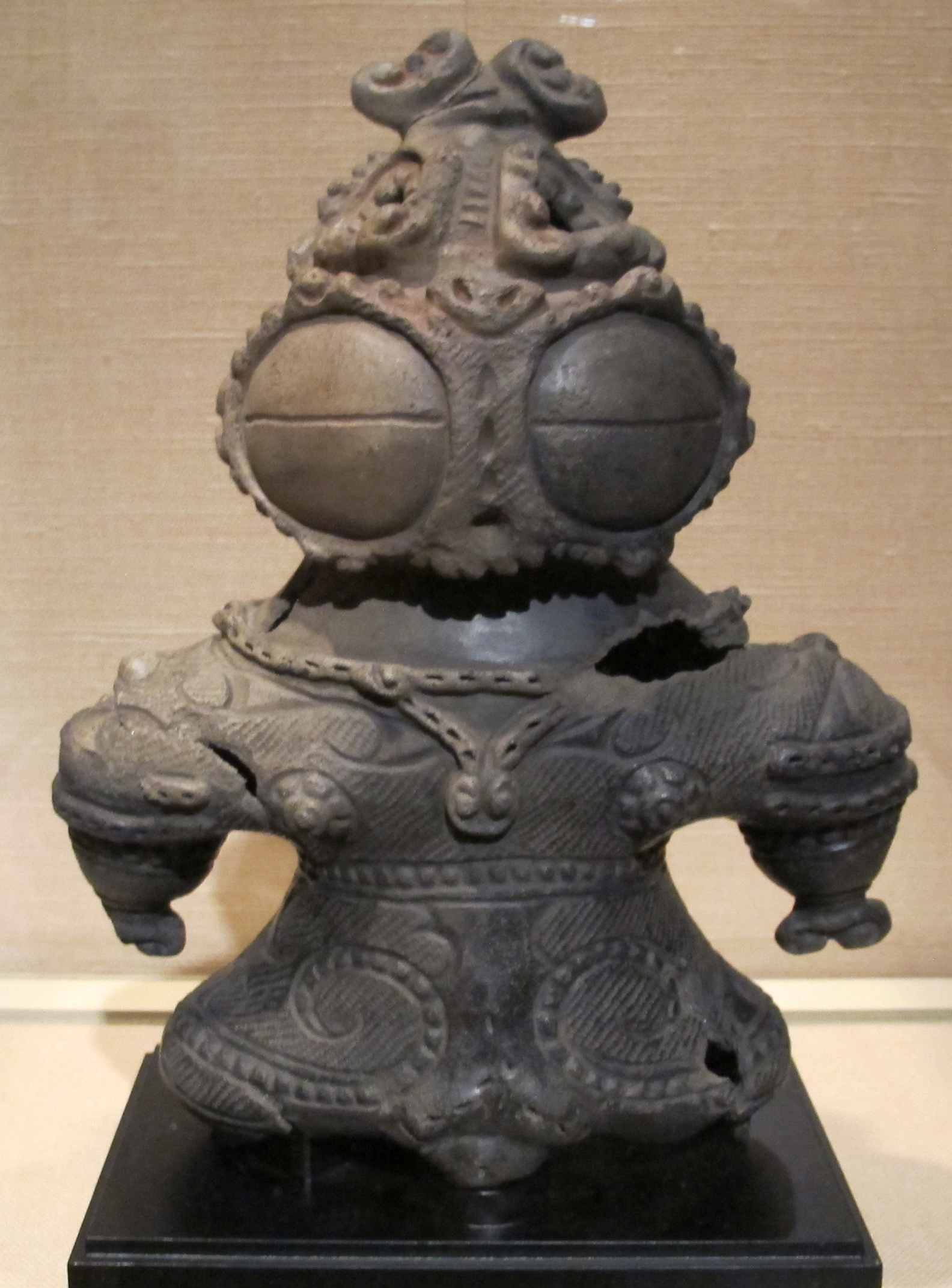 Metropolitan Museum